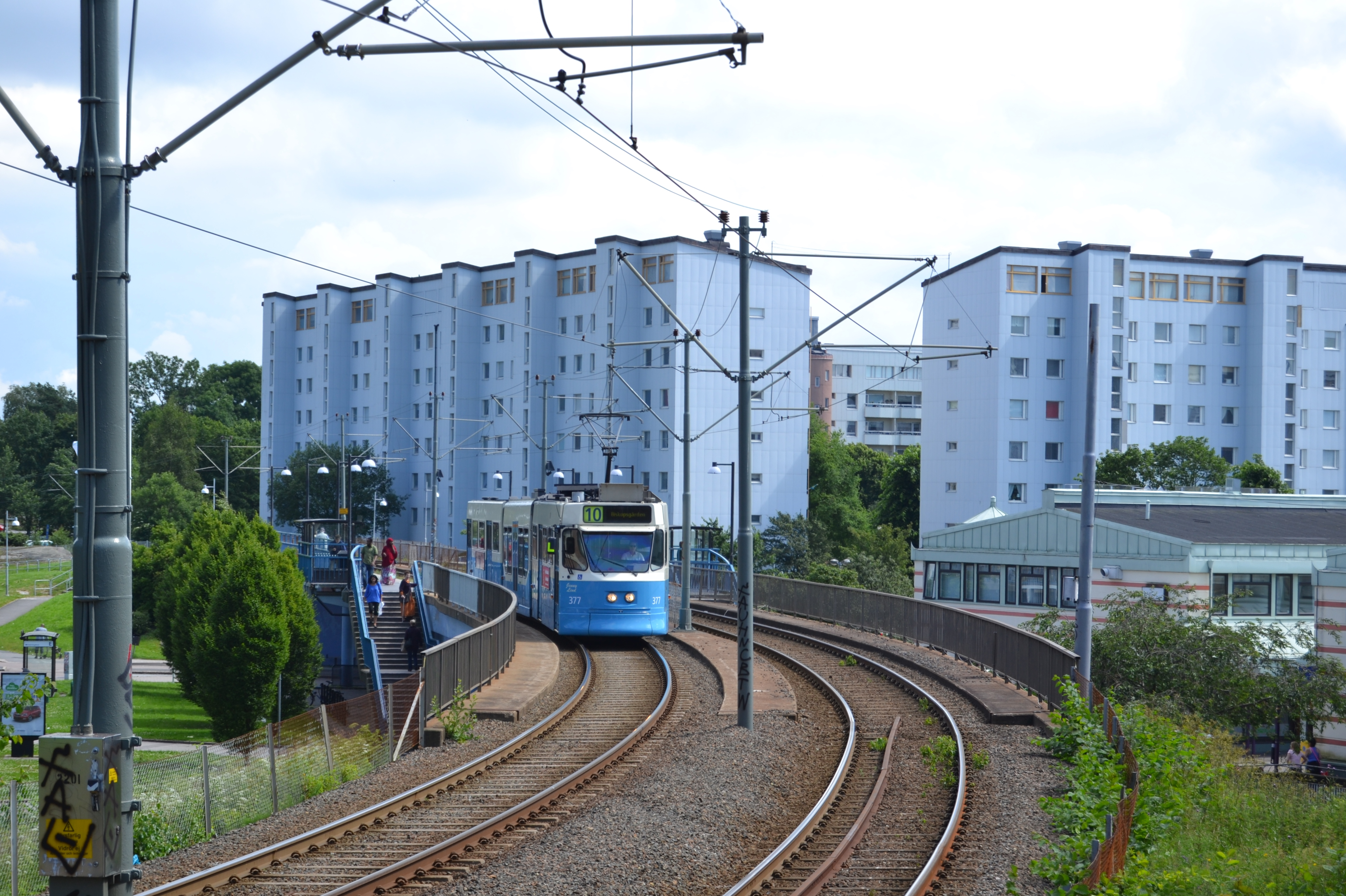 Spårvagnshållplatsen Vårväderstorget